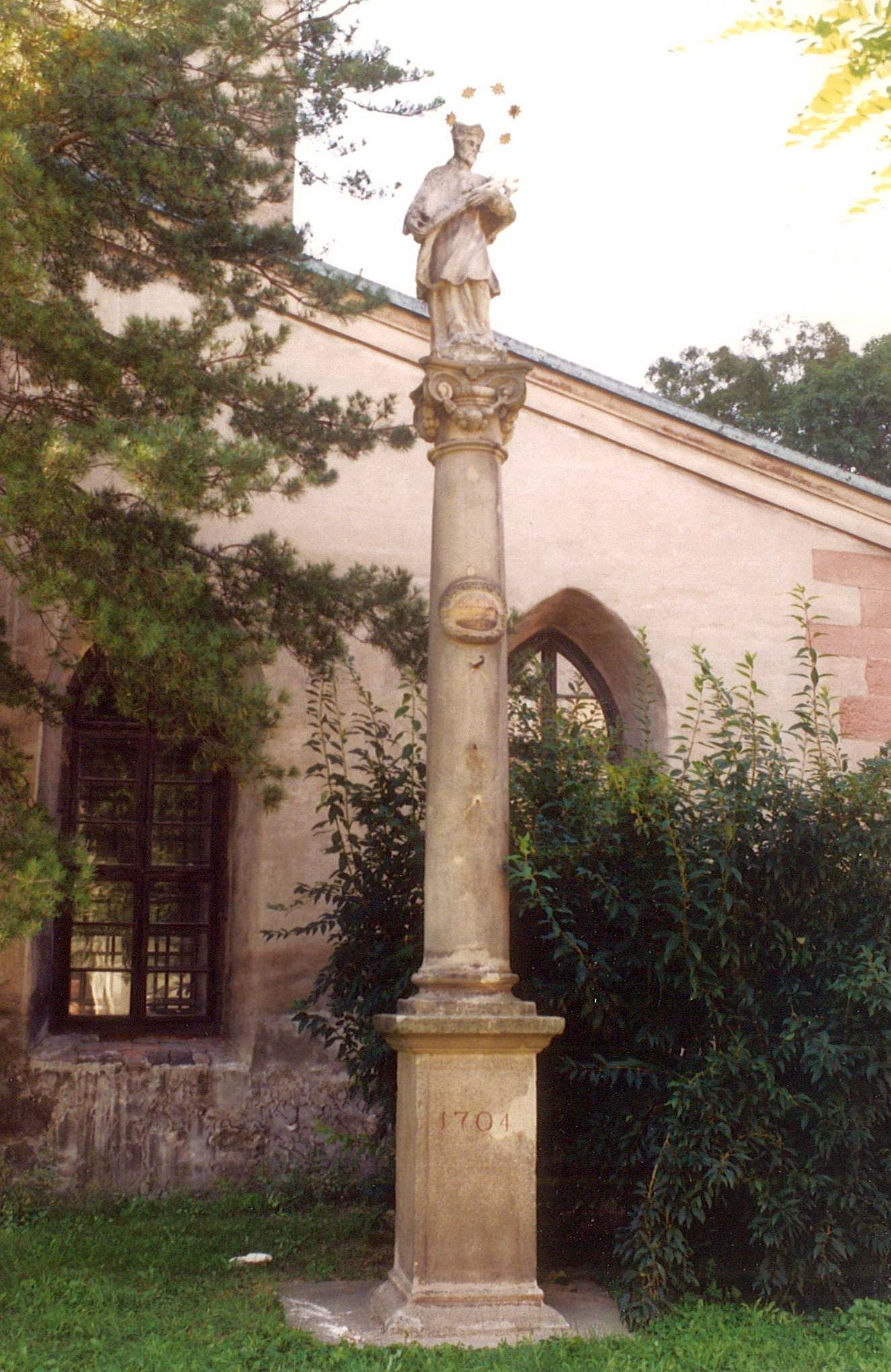 Sloup se sochou svatého Jana Nepomuckého, u mostu, pp. 3117/5, Kroměříž. Umístění sloupu na nádvoří u kostela sv. Mořice.